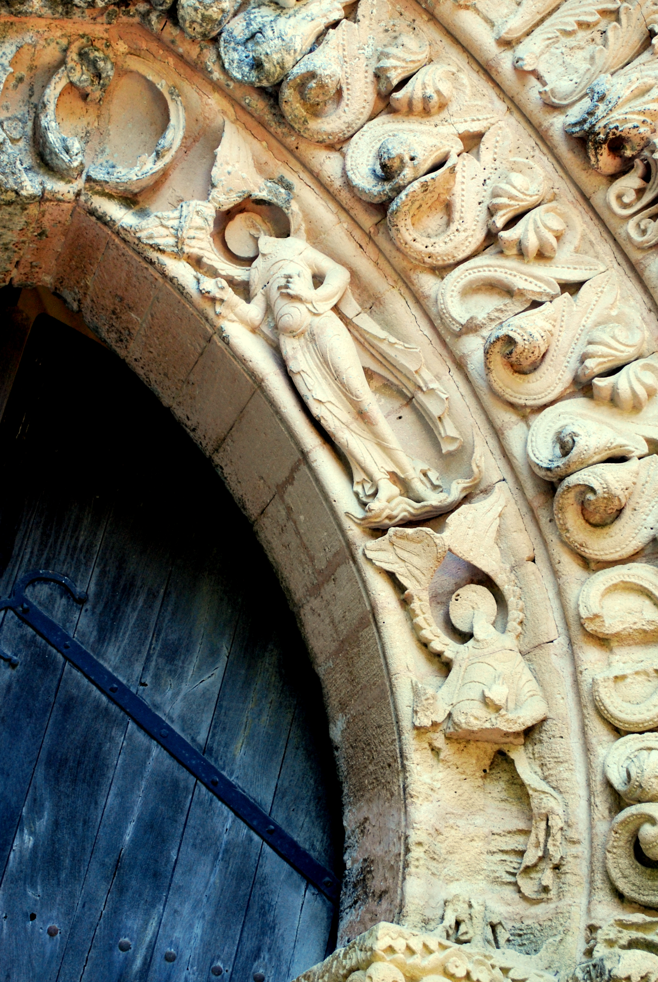 Blasimon église St Nicolas Voussure